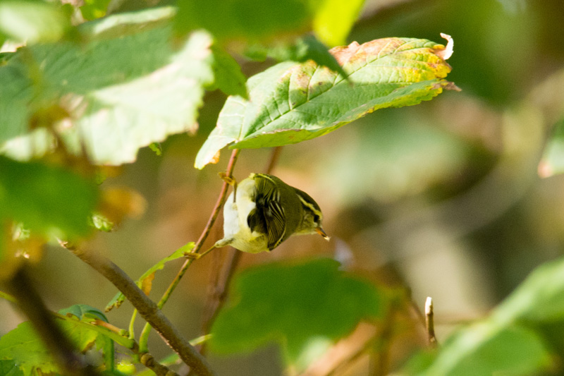 bladkoning-2.jpg